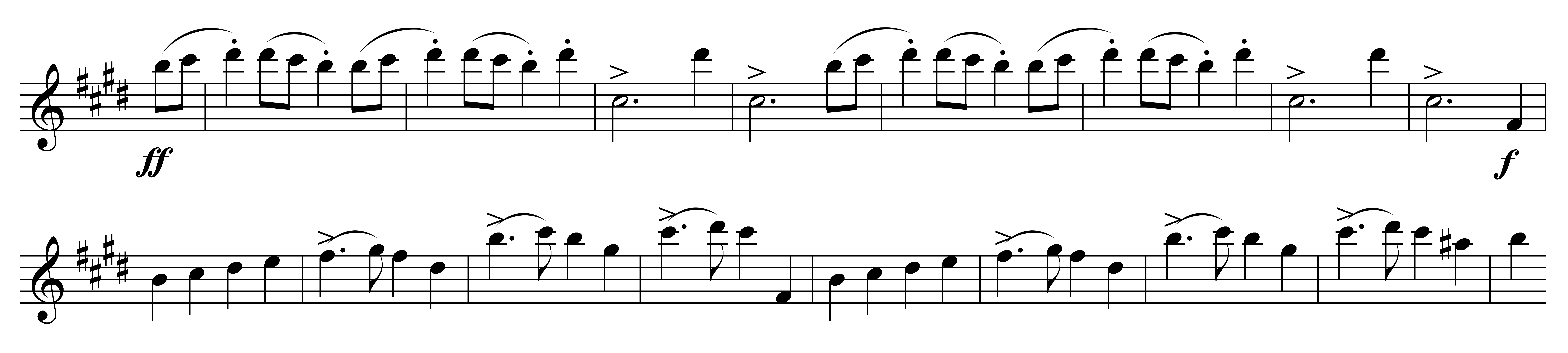 Notenbeispiel Mendelssohn Sommernachtstraum - Rüpeltanz T. 198-214